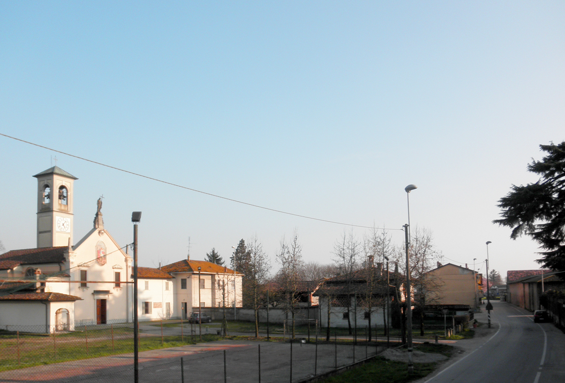 Vista di Melegnanello, frazione di Turano Lodigiano.